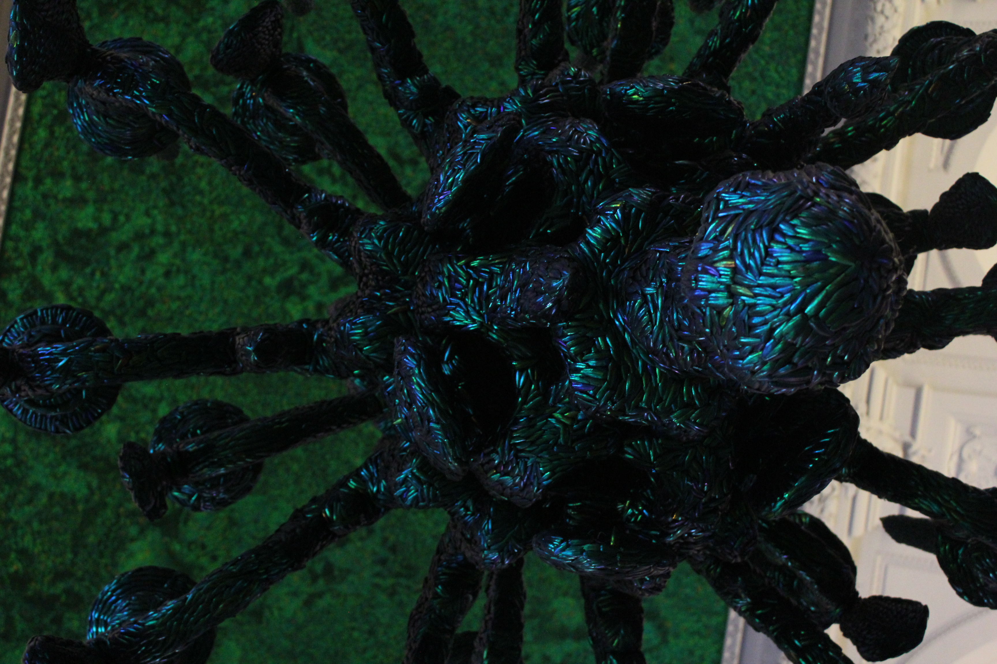 Зеркальная комната имеет потолок, выложенный из крыльев более чем миллиона тайских жуков-скарабеев.